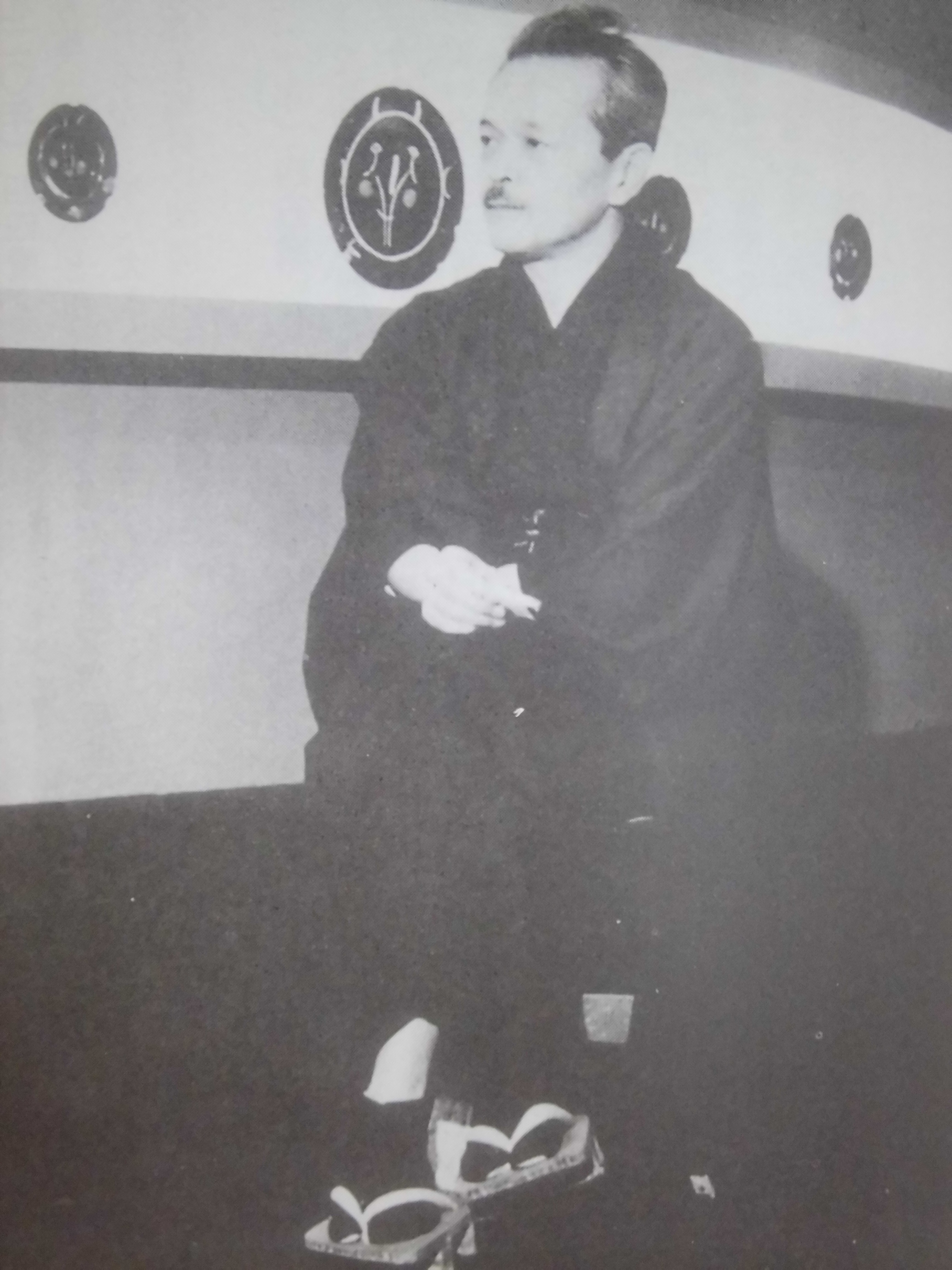 青山二郎（Aoyama Zirou）